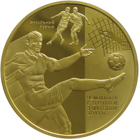 Золота монета Євро 2012 реверс